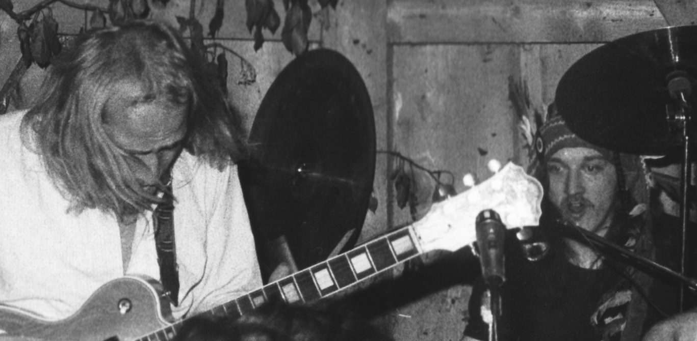 Das Bild zeigt den Gitarristen Didi Holzner bei einem Schwoißfuaßkonzert, das um 1980 stattfand. Im Hintergrund ist der Drummer der Band "Saulla Bradke" zu sehen.